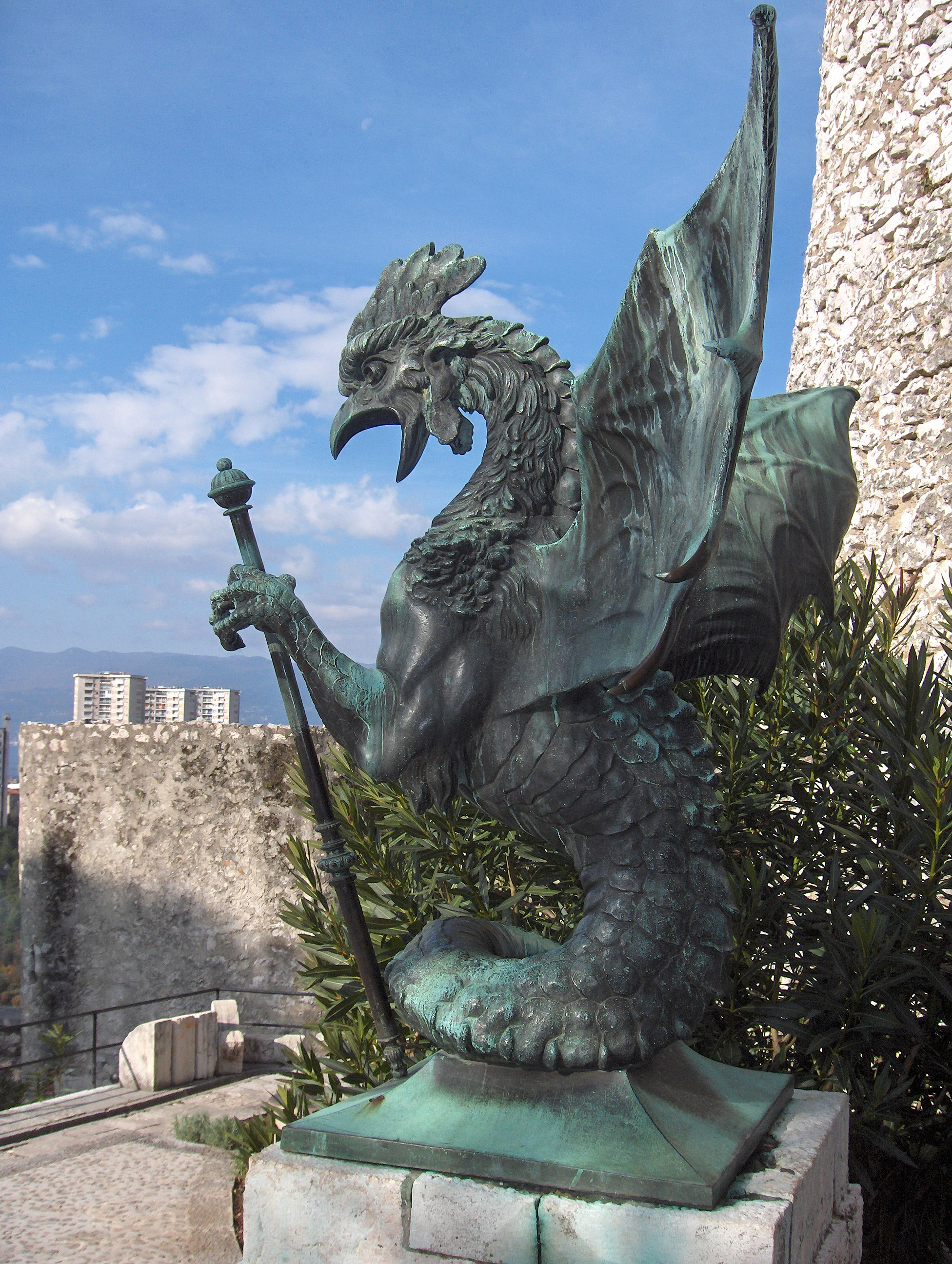 Basilisk; Trsat Castle, Rijeka, Croatia